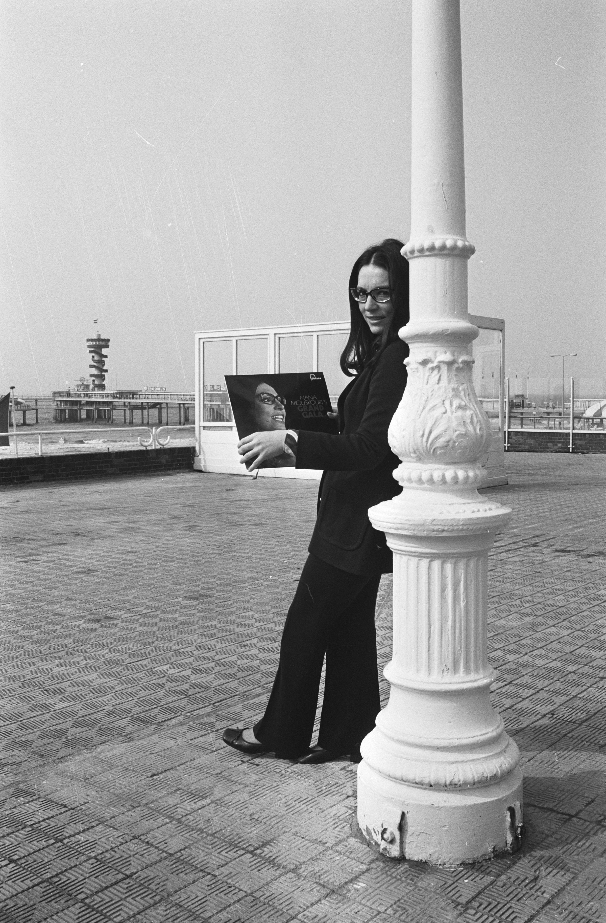 Collectie / Archief : Fotocollectie Anefo Reportage / Serie : Nana Mouskouri krijgt een gouden en een platina plaat in het Kurhaus te Beschrijving : Nana Mouskouri toont haar platen Datum : 13 mei 1971 Locatie : Scheveningen, Zuid-Holland Trefwoorden : zangers Persoonsnaam : Mouskouri, Nana Fotograaf : Fotograaf Onbekend / Anefo Auteursrechthebbende : Nationaal Archief Materiaalsoort : Negatief (zwart/wit) Nummer archiefinventaris : bekijk toegang 2.24.01.05 Bestanddeelnummer : 924-5528